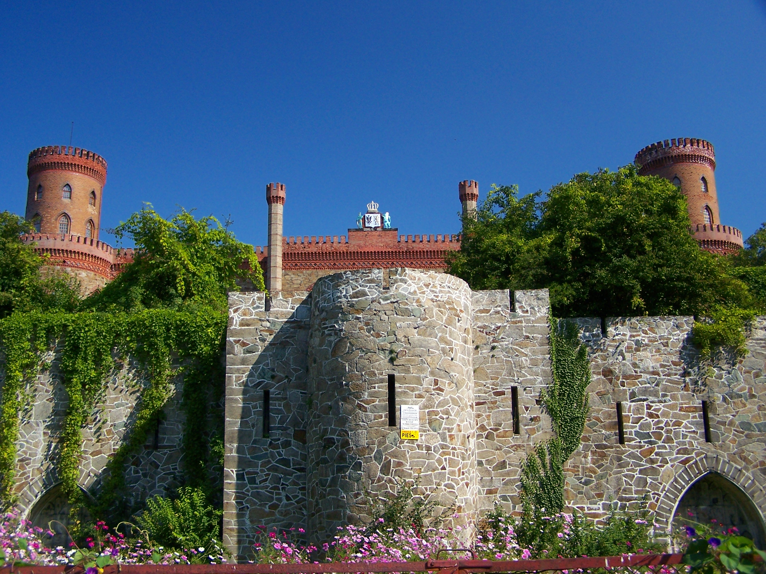 Zamek w Kamieńcu Ząbkowickim.